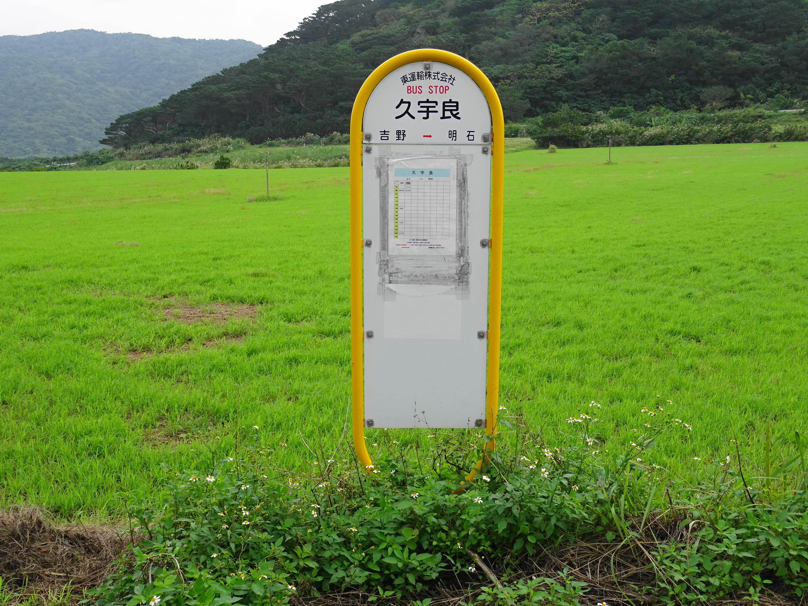 Kūra